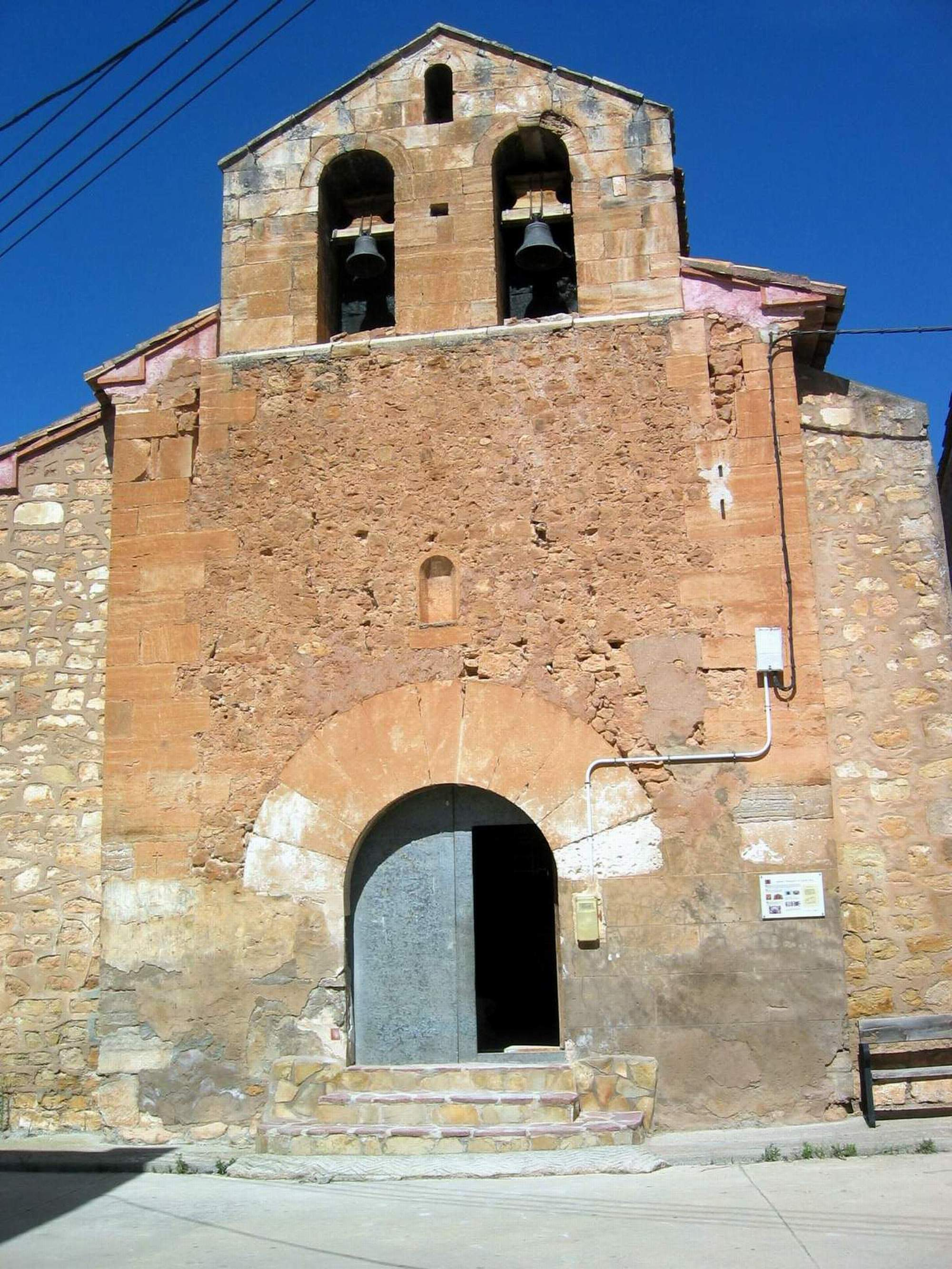 Fachada principal (occidental) de la iglesia parroquial de Santa Anta en Torrealta (Valencia).